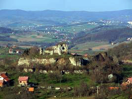 Die Burgruine Cetin in der kroatischen Gemeinde Cetingrad.